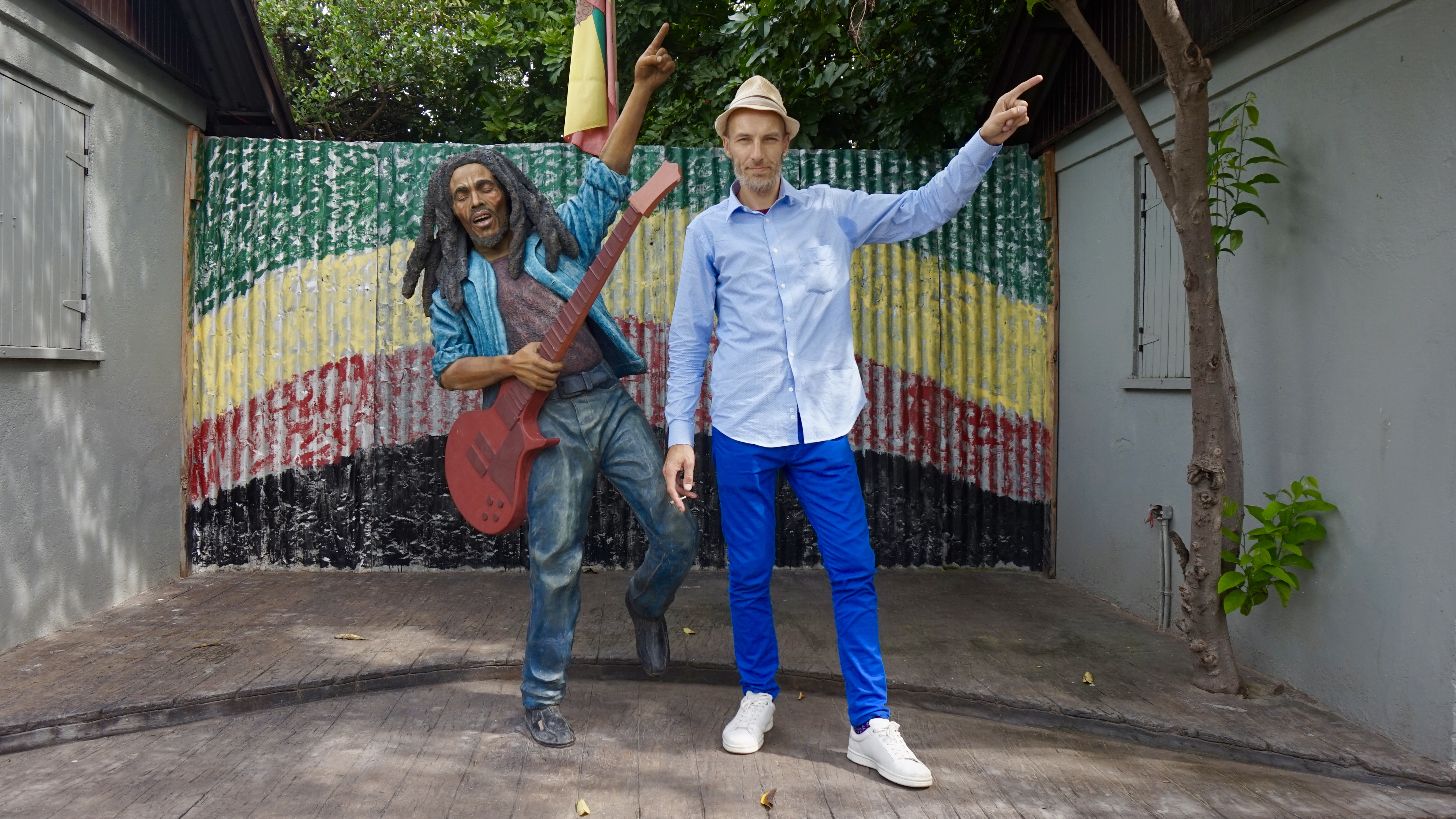 Trenchtown, Kingston, Jamaica (2018)